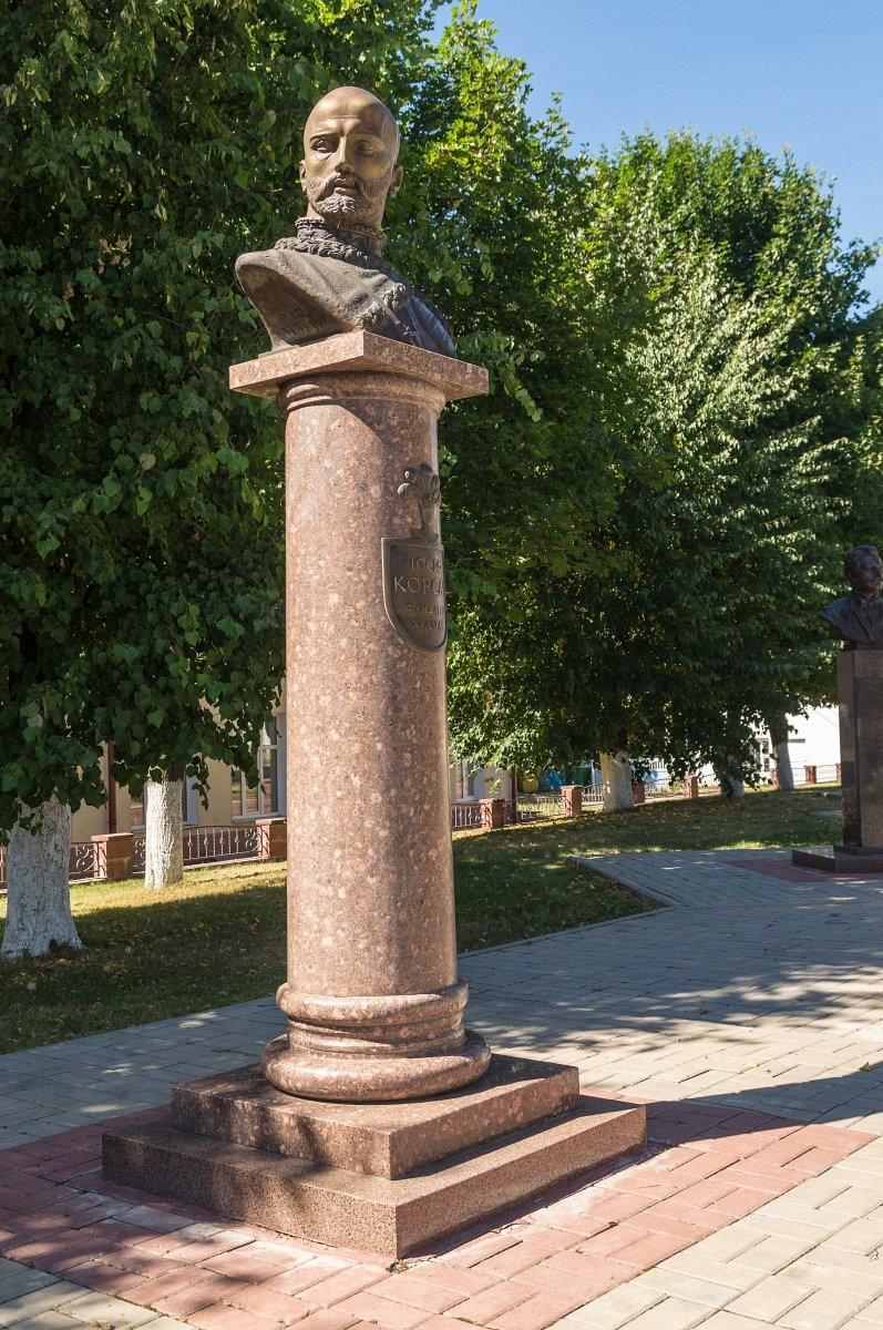 Глыбокае. Бюст Іосіфа Корсака